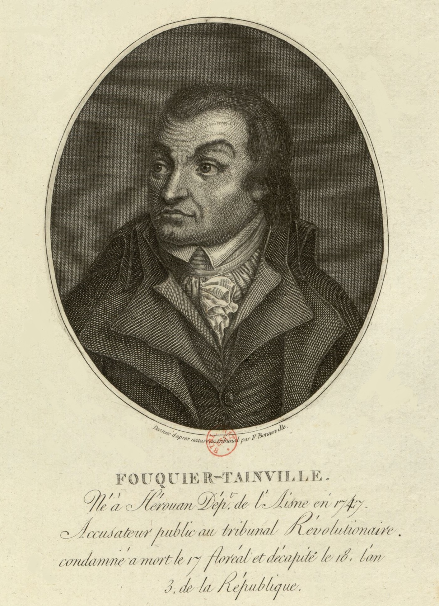 Estampe portraiturant Antoine Fouquier-Tinville.